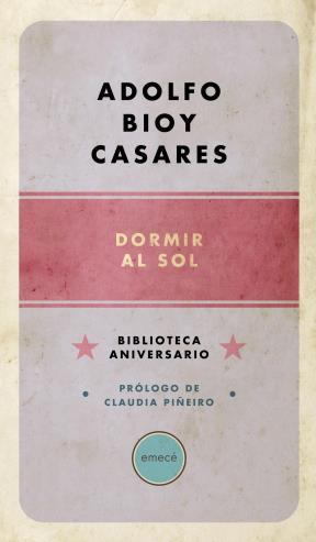 Dormir al sol (Novela de Adolfo Bioy Casares)